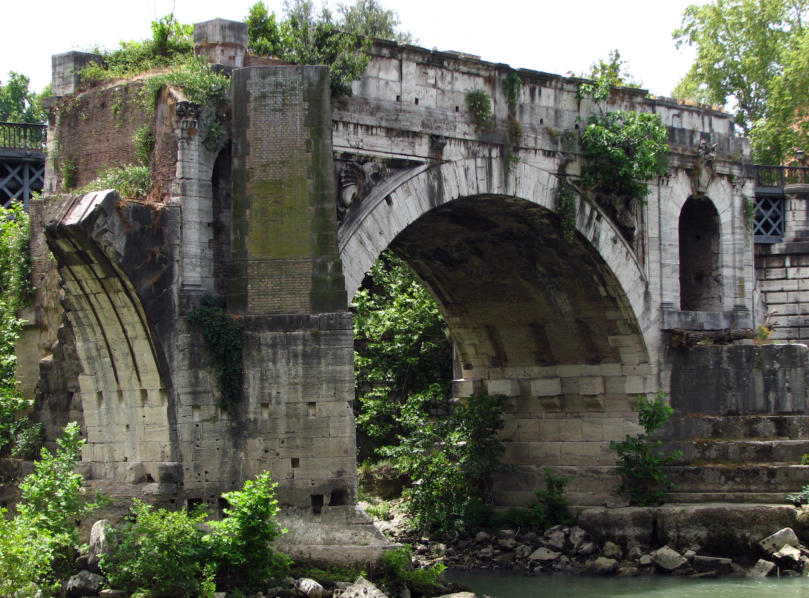 Roma, Italia